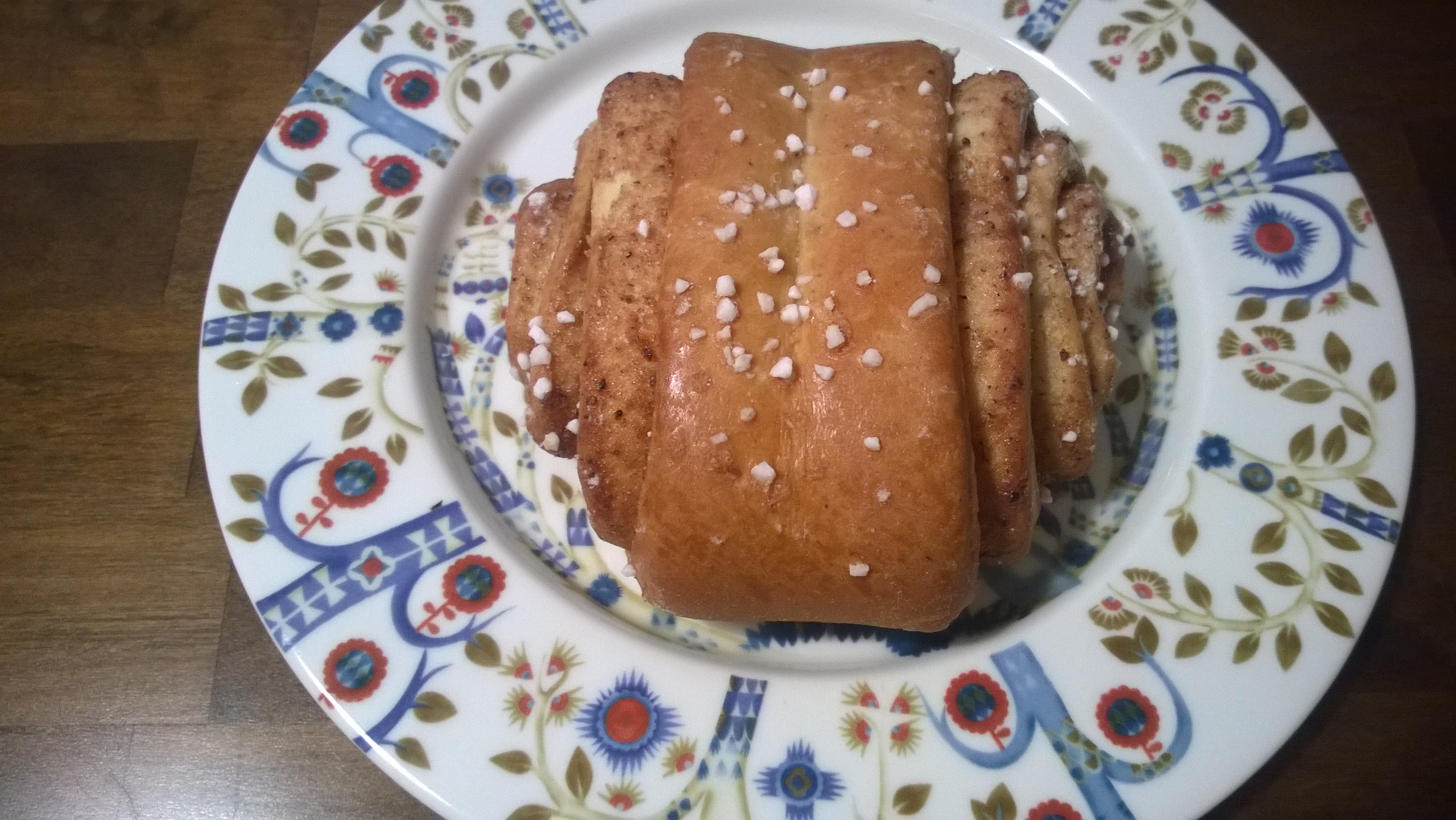 Korvapuusti